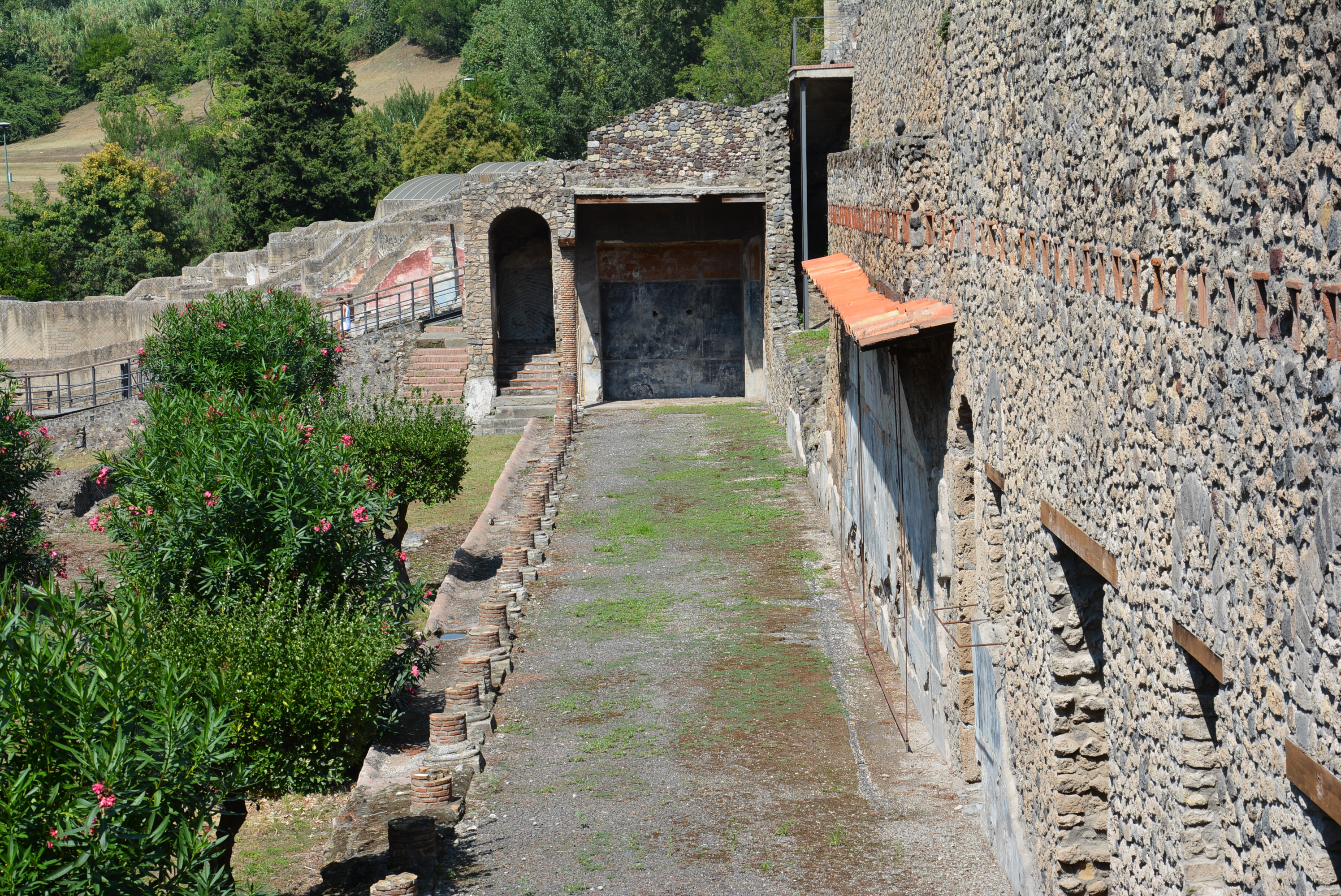 Villa Imperiale - MIBACT This is a photo of a monument which is part of cultural heritage of Italy.